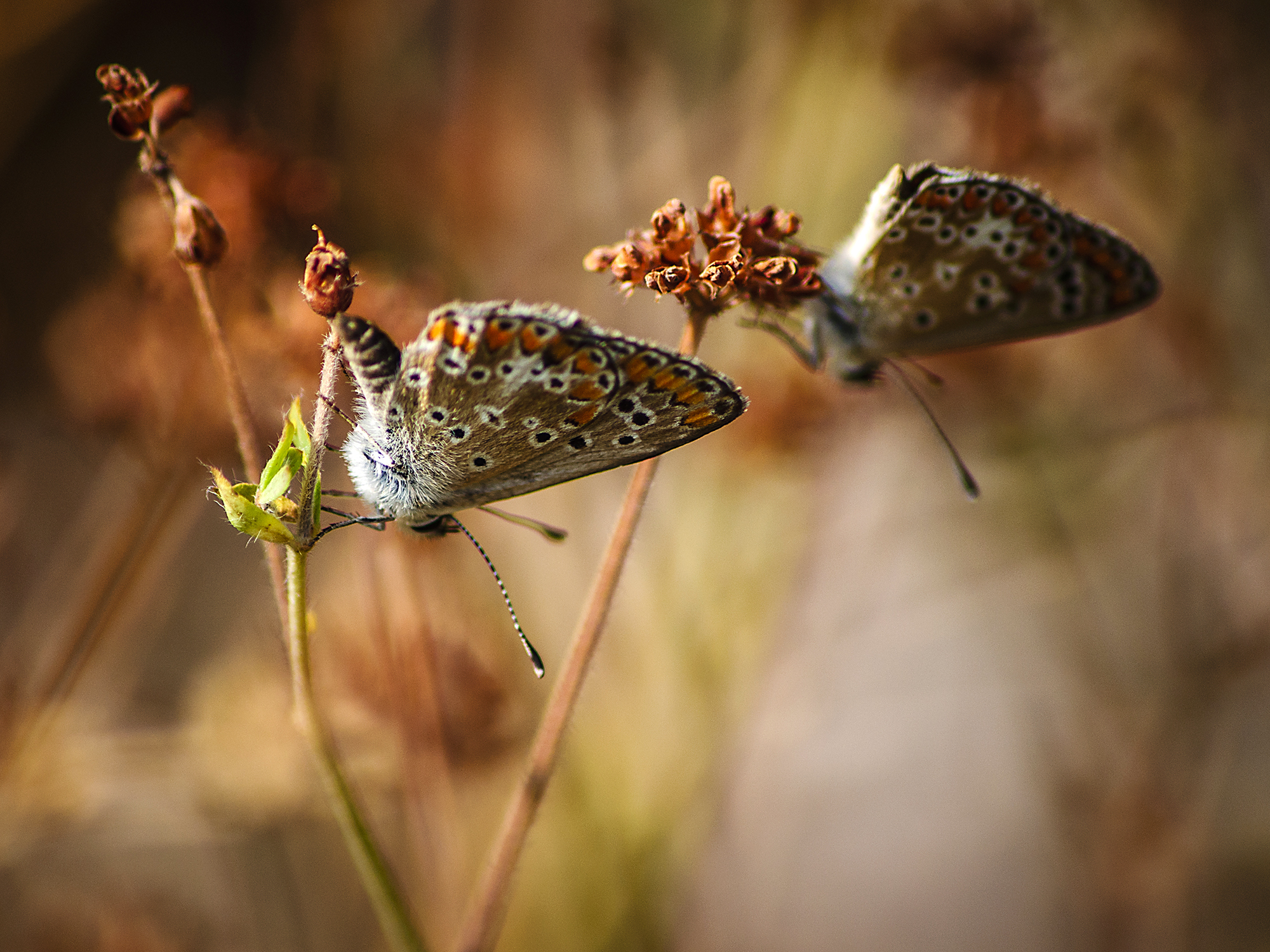 Пепрутки од околината на Вишни